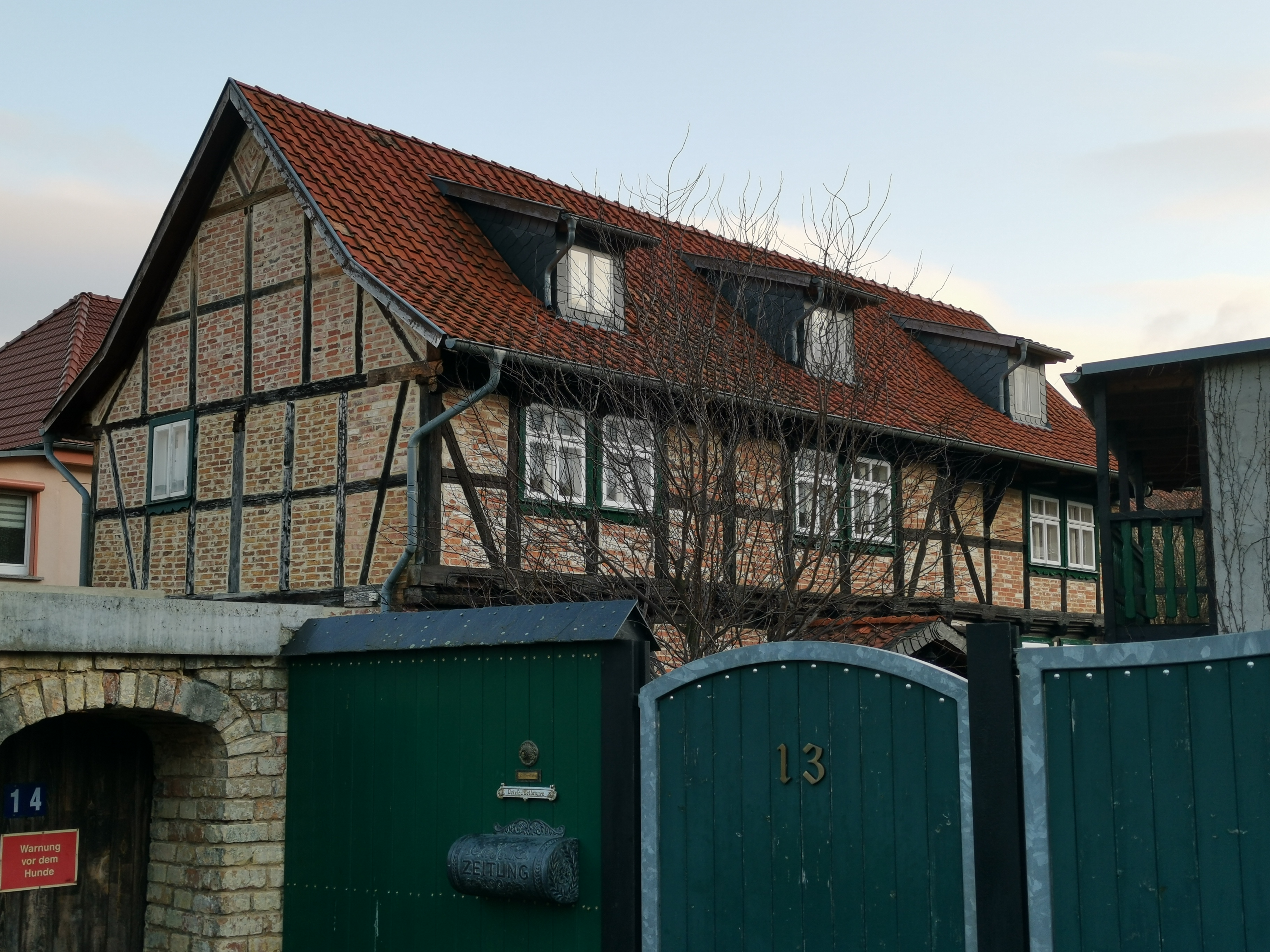 Kirchstraße 13 in Timmenrode